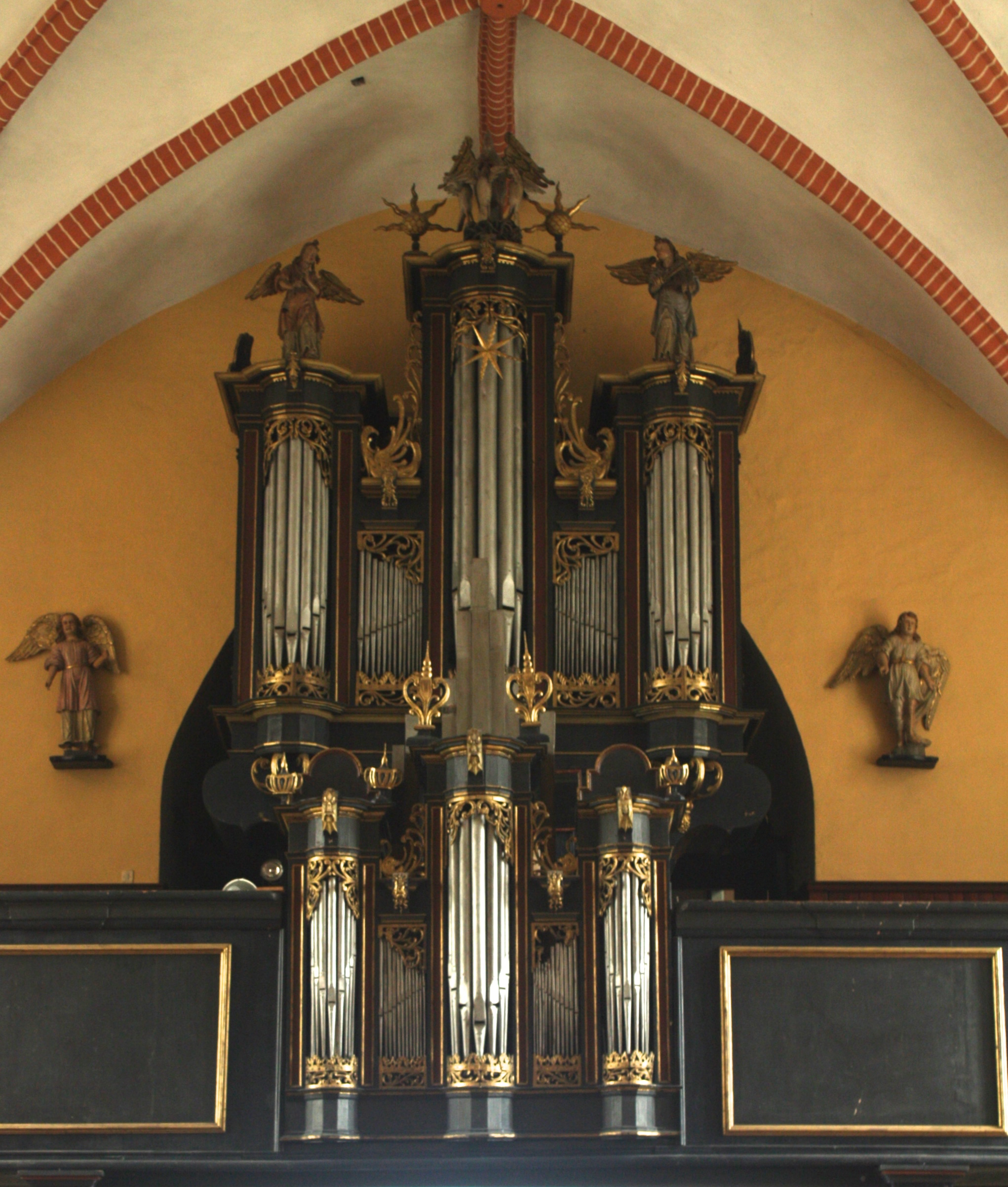 Węgorzewo, ul. Zamkowa 16 - dawny kościół ewangelicki, obecnie rzymskokatolicki parafialny p.w. świętych Piotra i Pawła, 1605-1611 (wnętrze) You can see all photographs in category Wikiekspedycja 2012. The making of this document was supported by Wikimedia Polska.